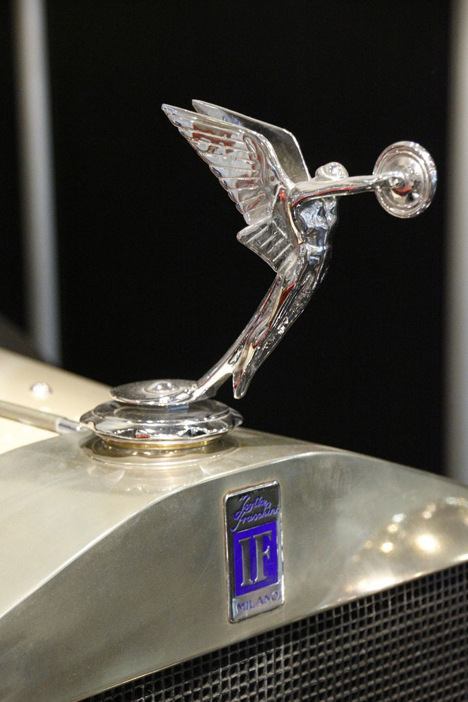 1929 Isotta Fraschini 8 AS Landaulette Im periale_IMG_2934